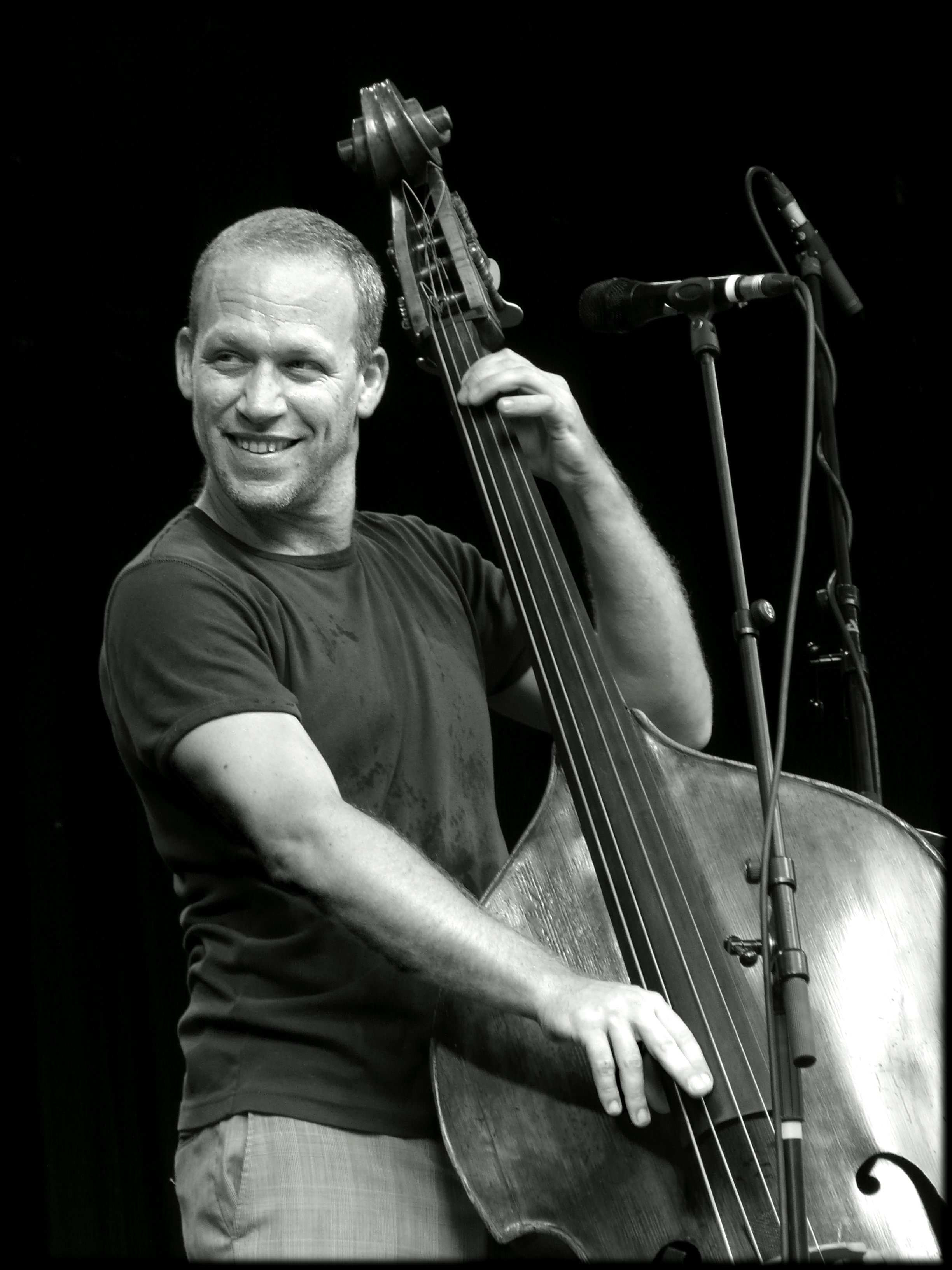 Avishai Cohen lors du concert donné au Brosella Folk et Jazz 2010.